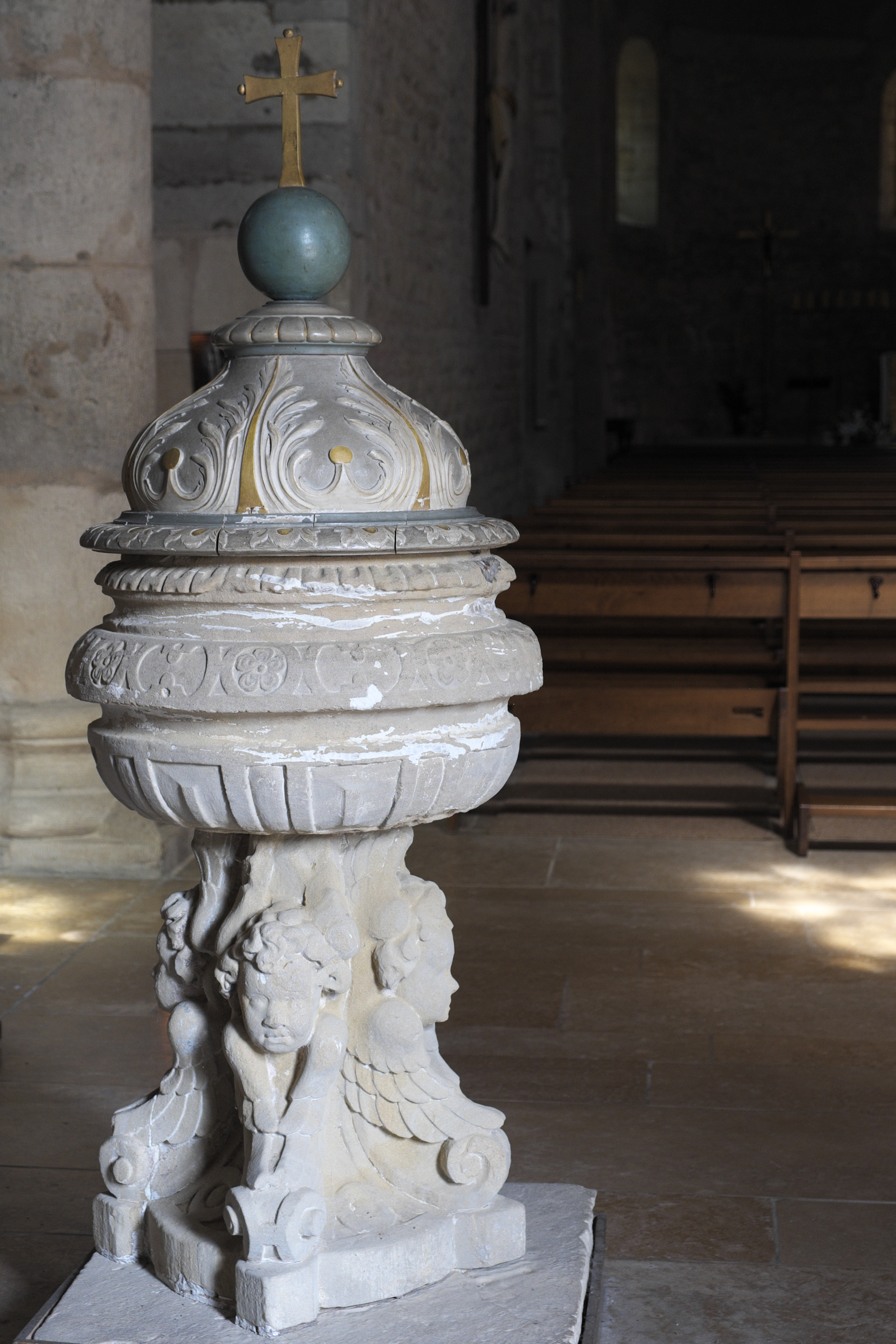 Kirche Saint-Jacques-le-Majeur (Jakobus der Ältere) in Feldbach im Département Haut-Rhin (Elsass/Frankreich), Taufstein aus dem 17. Jahrhundert